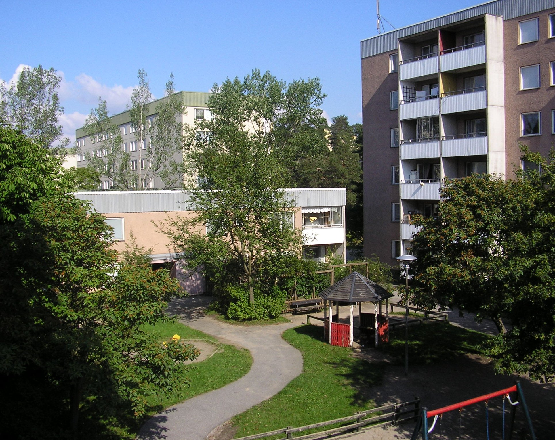 View from Kämpingebacken 13 in Tensta.